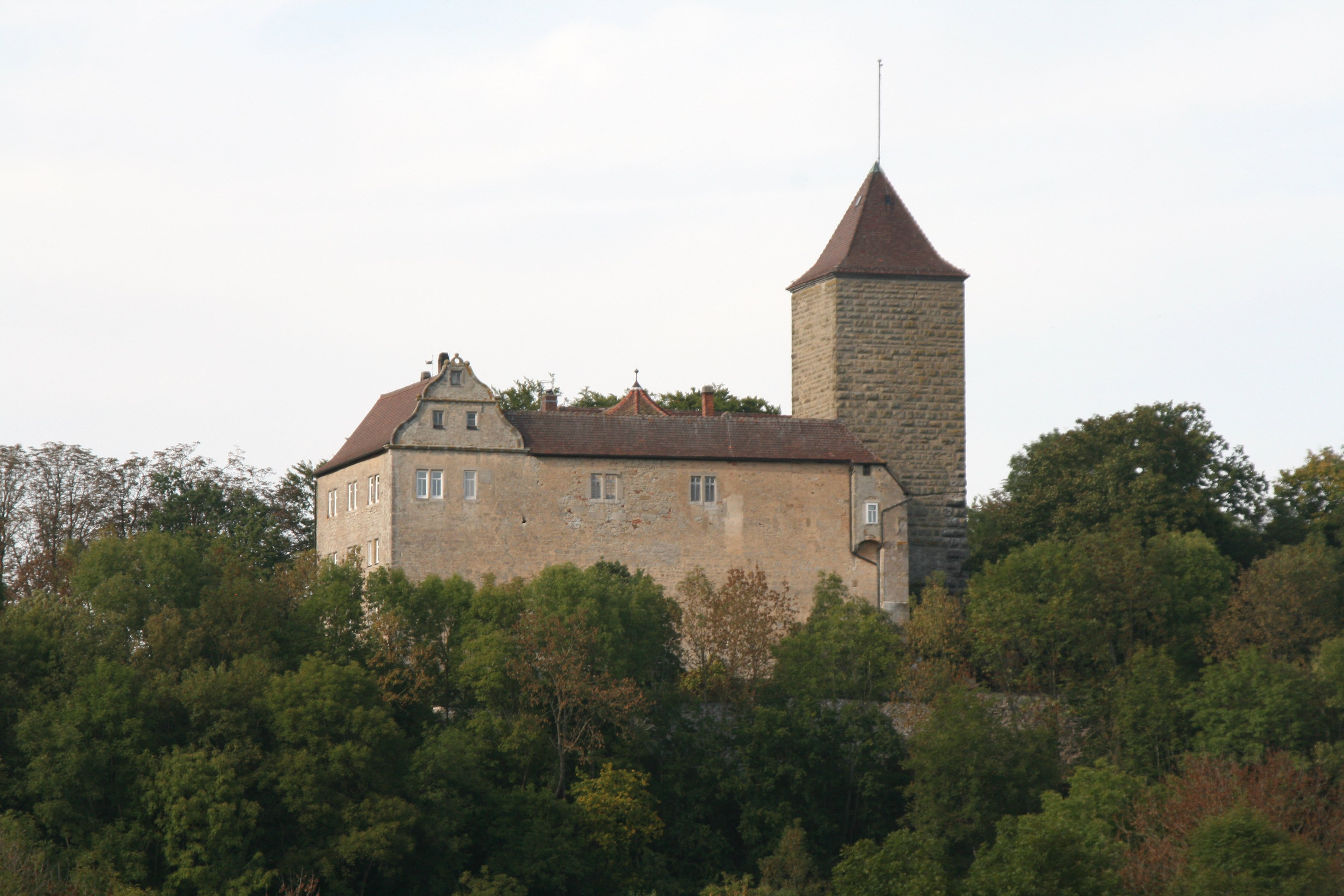 Schloss Hornberg in Kirchberg an der Jagst-Hornberg von der anderen Seite der Jagst aus gesehen